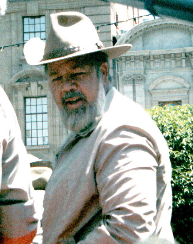 Afrikaner Weerstandsbeweging (AWB) leader Eugene Terreblanche.